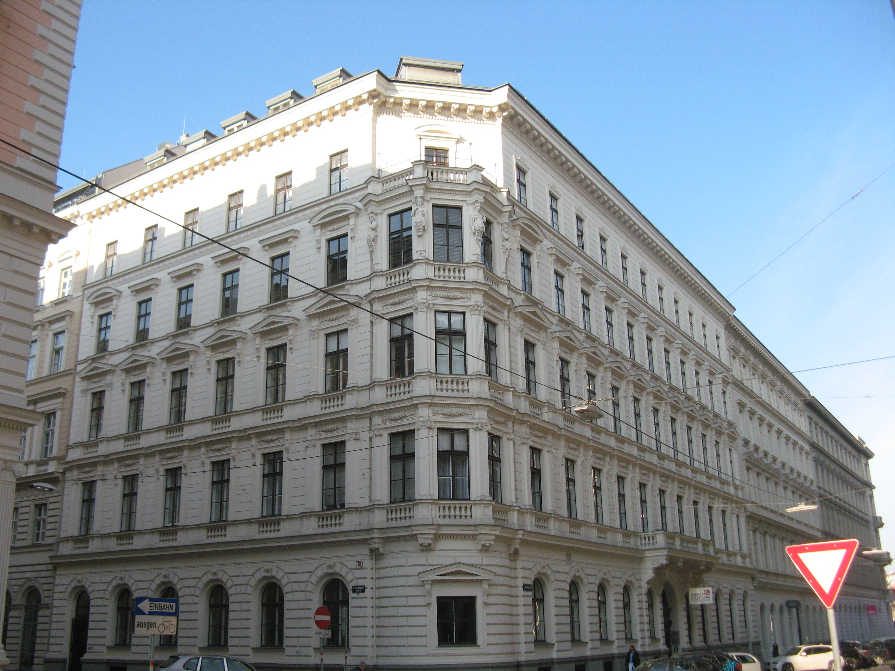 Haus Esslinggasse 13 (1869-70) von Carl Schumann, Wien-Innere Stadt